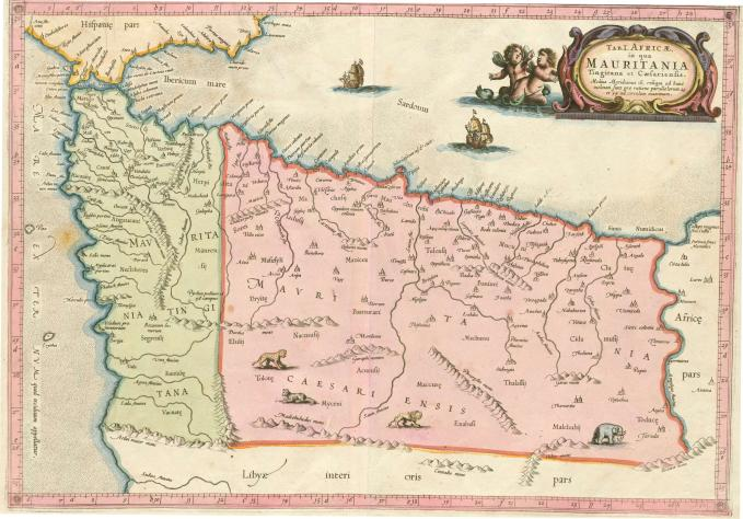 Hecho por Gerardo Mercator